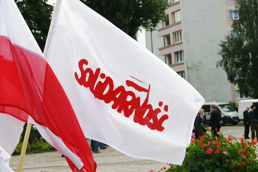 31.08.2011 Gdańsk, Flaga pod pomnikiem Poległych Stoczniowców gdzie Prezydent Bronisław Komorowski Bogdan Borusewicz oraz Józef Przybylski składali kwiaty w 31. rocznice podpisania Porozumień Sierpniowych